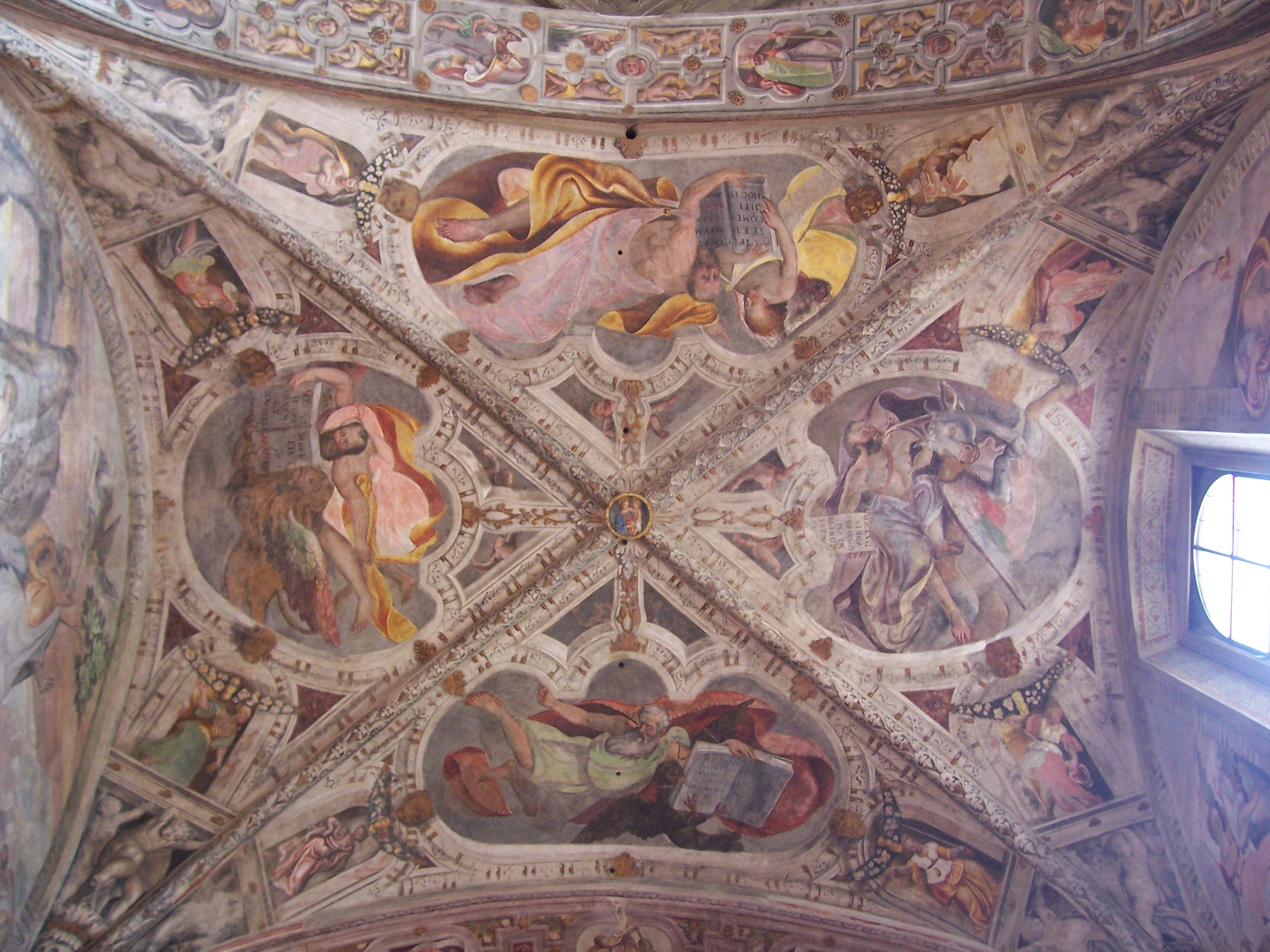 Santissimo corpo di cristo brescia interno5.jpg